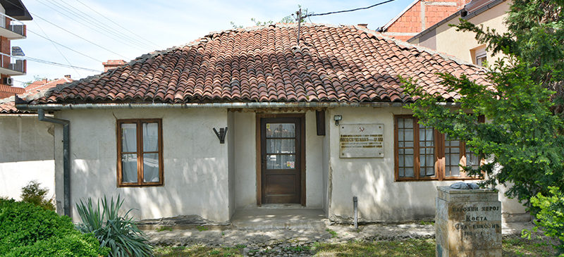 Srpski (latinica): Kuća Koste Stamenkovića. Ona je jedan od objekata koji pripadaju Narodnom muzeju u Leskovcu.